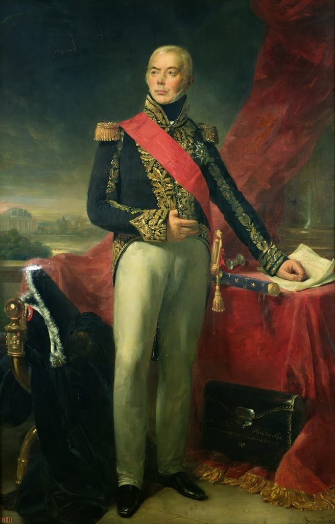 Maréchal de l'Empire en 1809, grand chancelier de la Légion d'Honneur de 1815 à 1831, représenté devant une vue de l'Hôtel de Slam, Grande-chancellerie de la Légion d'Honneur